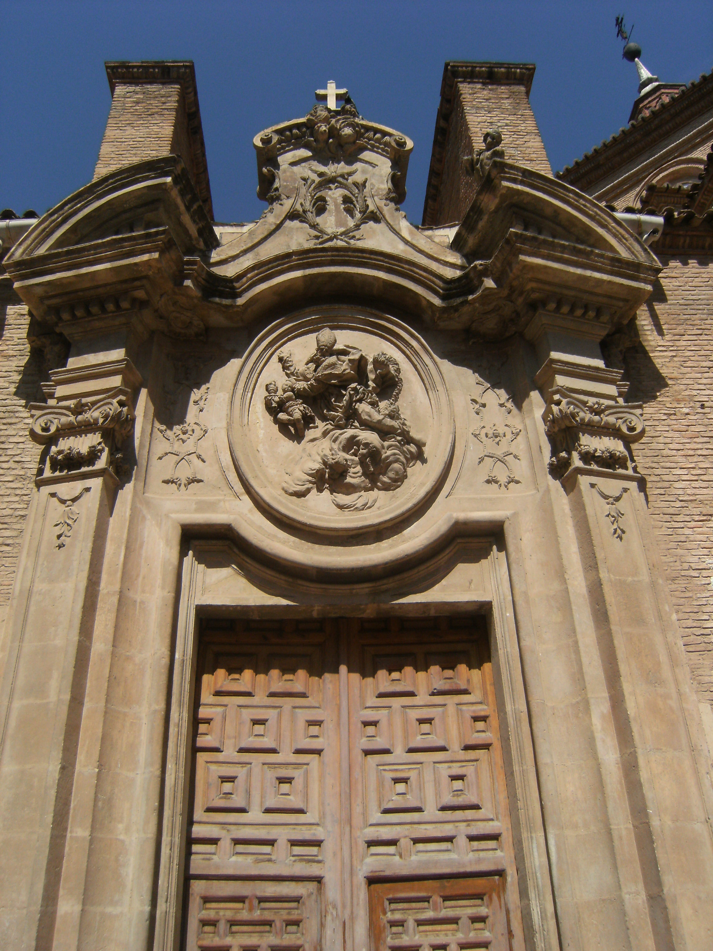 Puerta lateral de la Iglesia de San Nicolás de Bari de Murcia, España. Siglo XVIII.